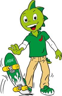 Jolinchen ist ein hellgrüner Drache mit fünf dunkelgrünen, hintereinander angeordneten Zacken auf dem Kopf und weiteren Zacken am Drachenschwanz.